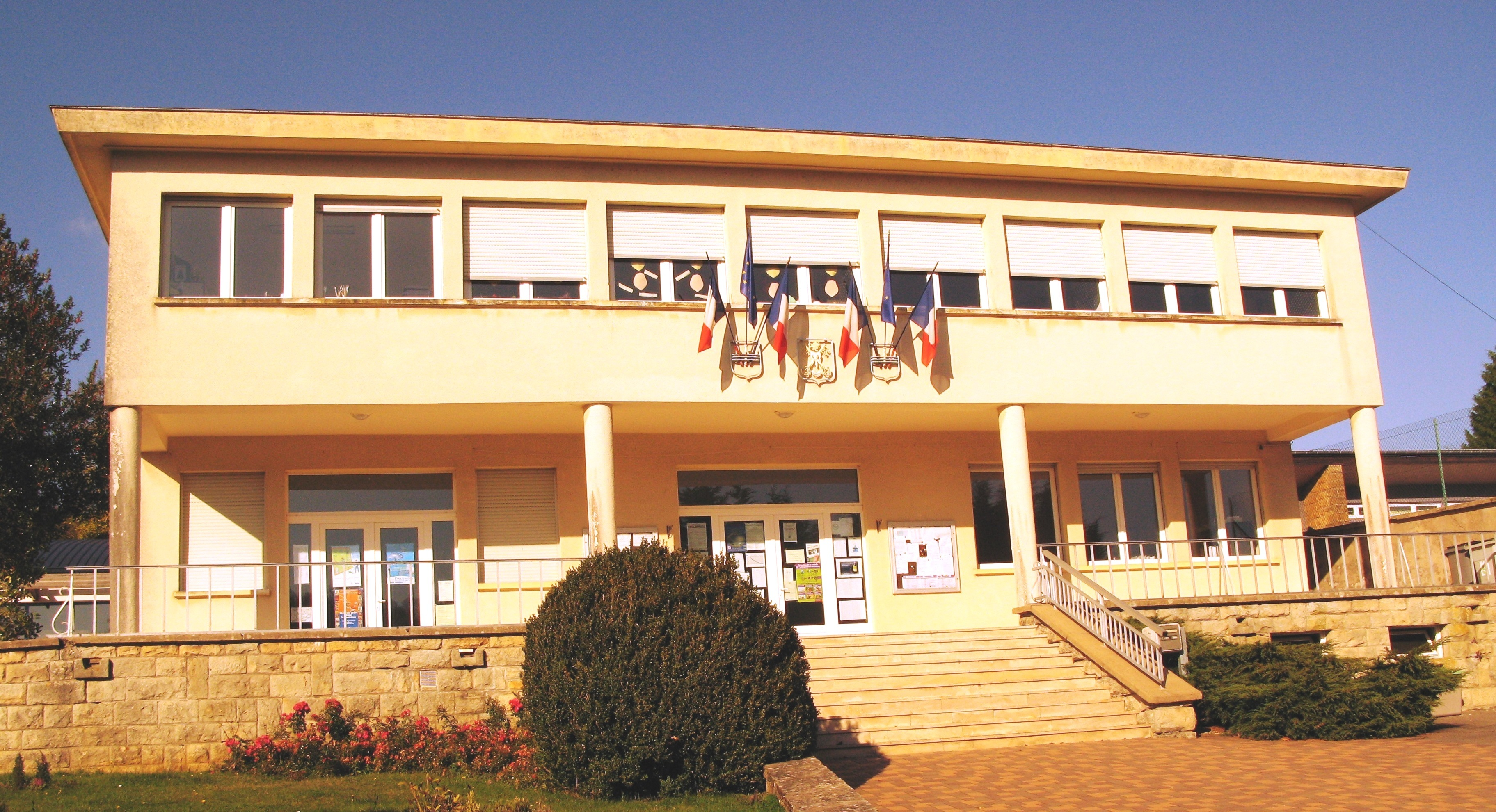 La mairie d'Escherange